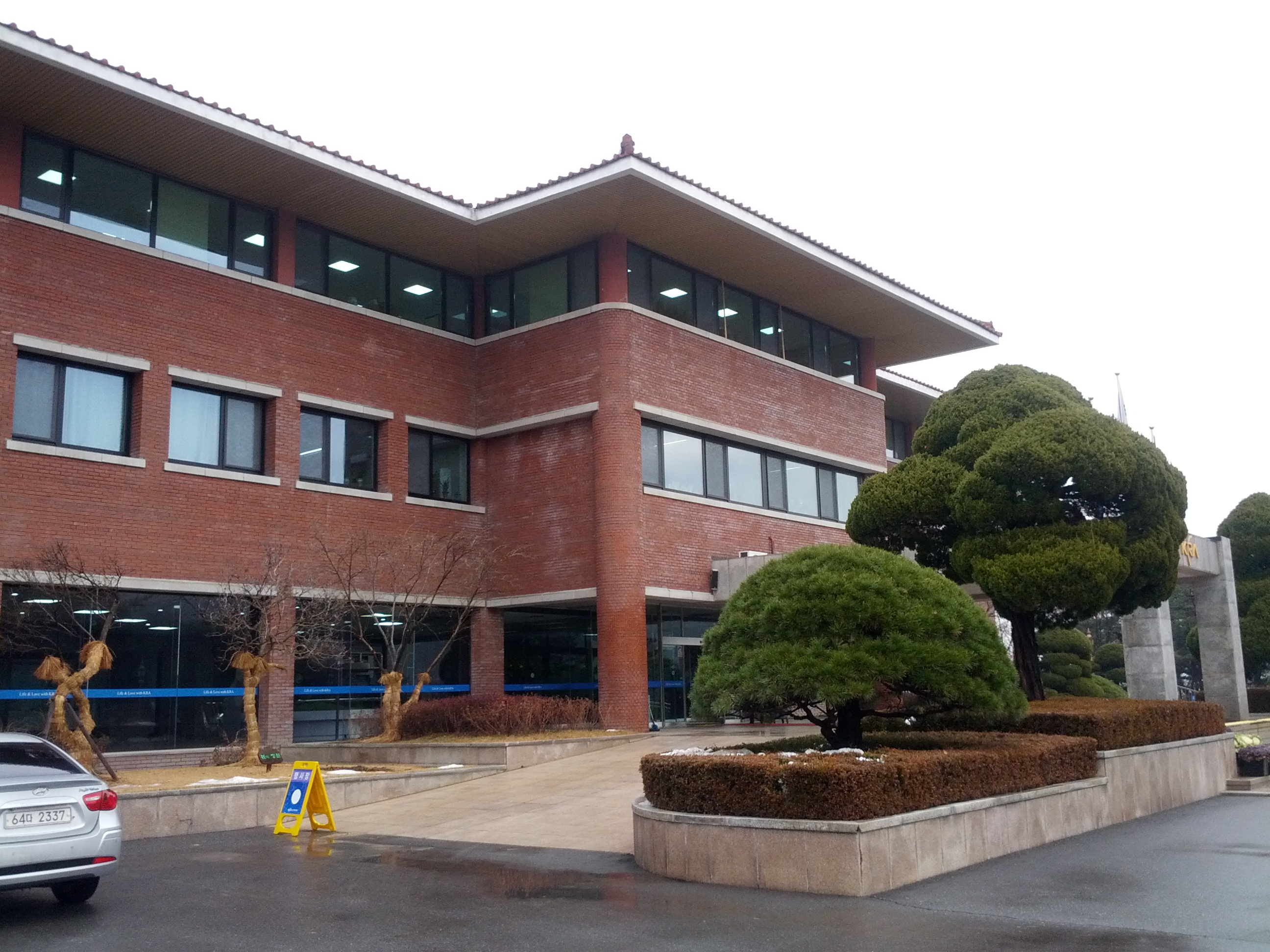 한국마사회 본관